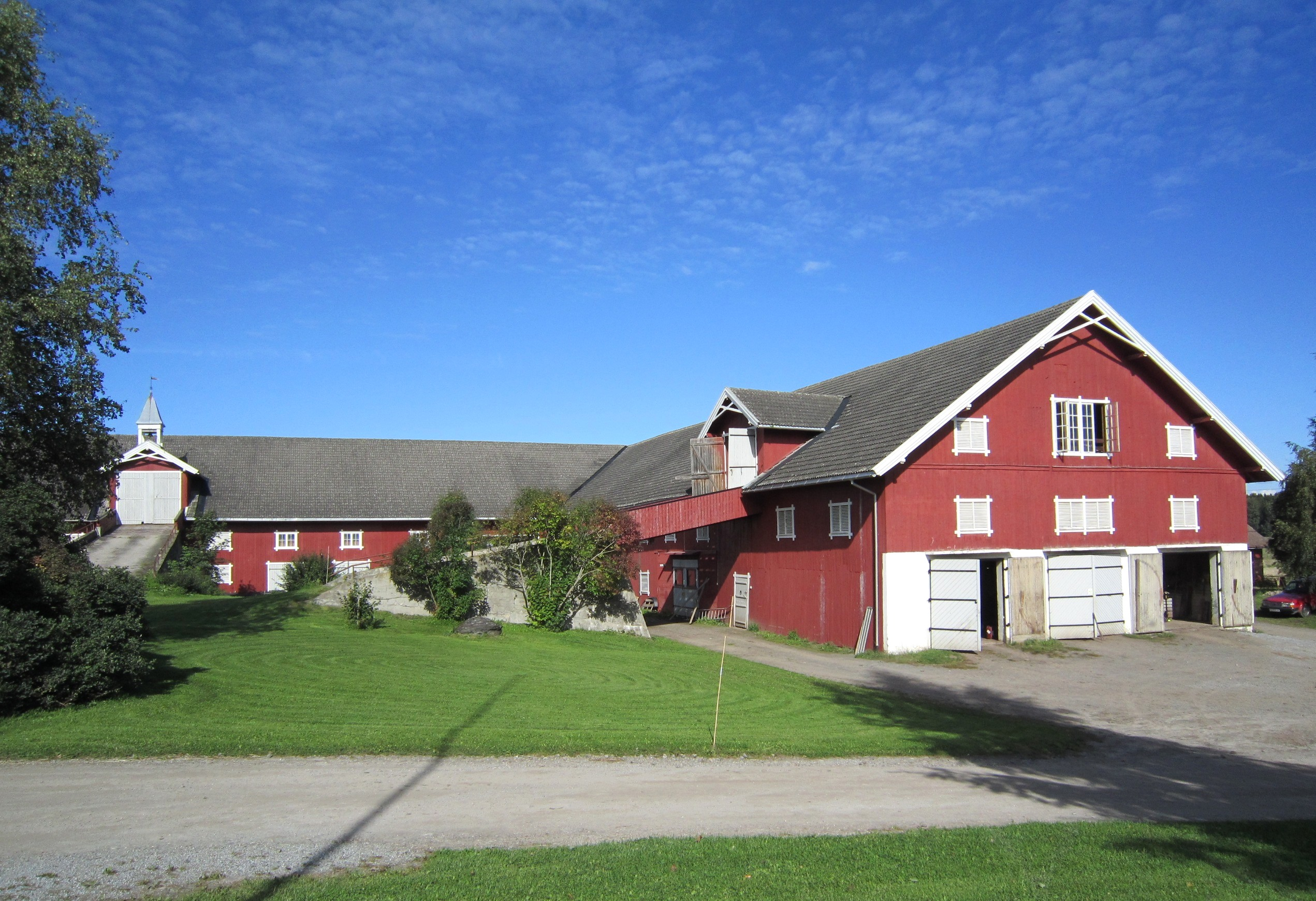 Fokholgutua (fylkesvei 1862, tidl. 197) går gjennom tunet på Fokhol gård.